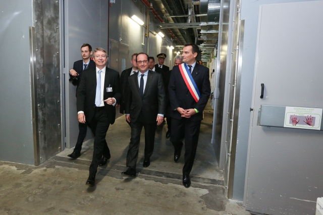 F. STALEY, directeur du GANIL présente les installations Spiral 2